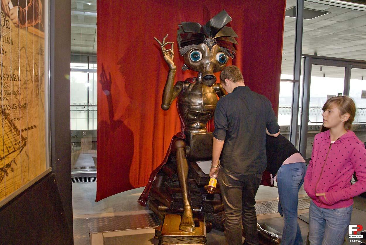 Elektrybałt - czyli elektroniczny poeta. Wpisujesz jemu jakieś słowa, a on tworzy mową wiązaną na kanwie tych słow co chcesz: poemat, tren, sonet...